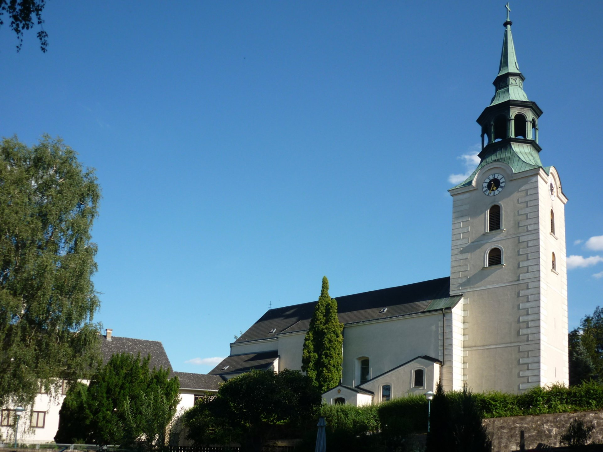 Farní kostel Sv. Linharta v Dobersbergu